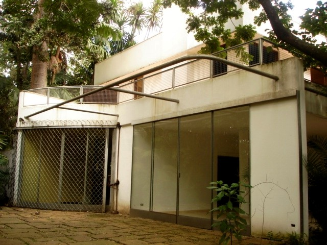 Casa modernista rua Santa Cruz